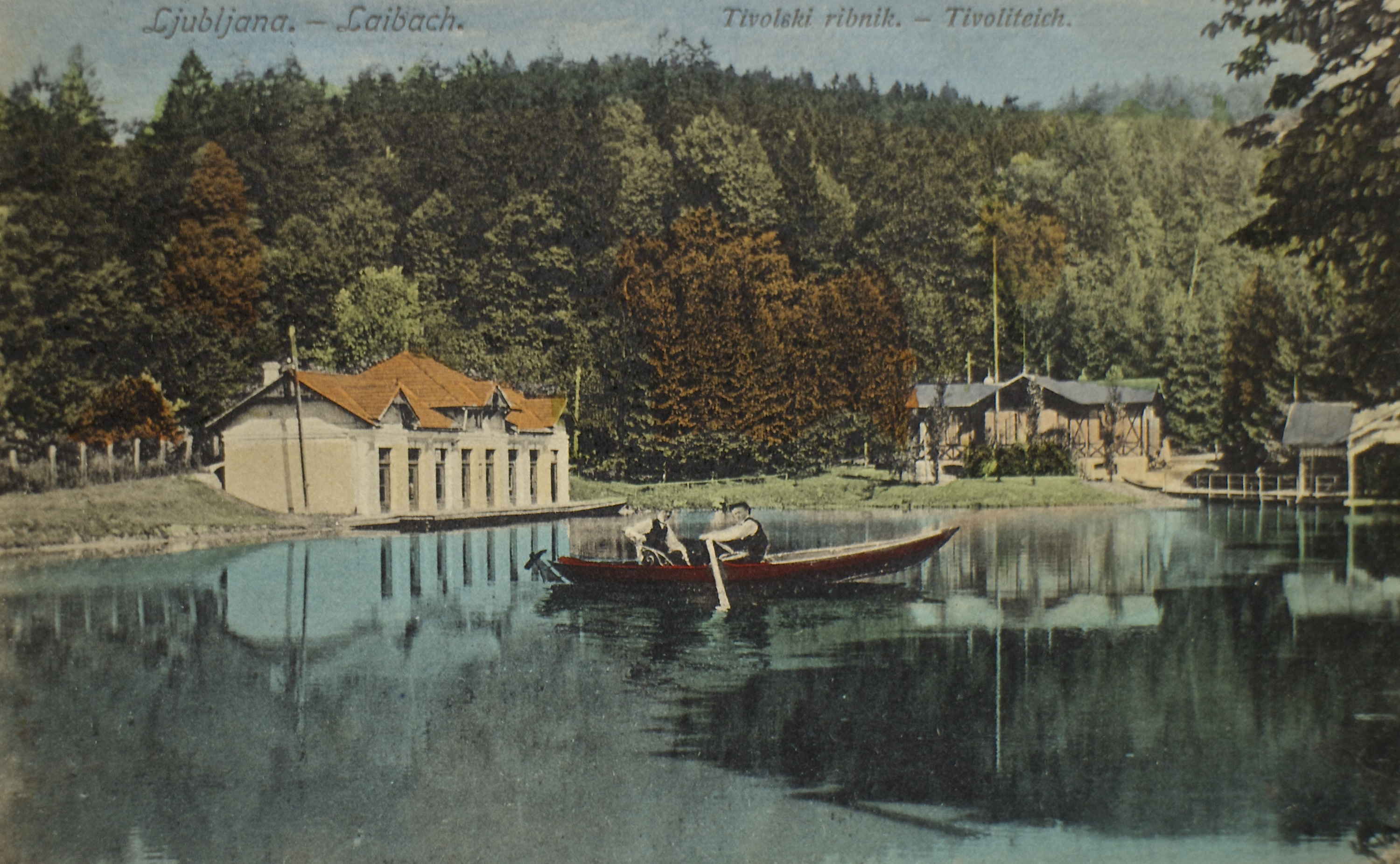 Razglednica tivolskega ribnika.